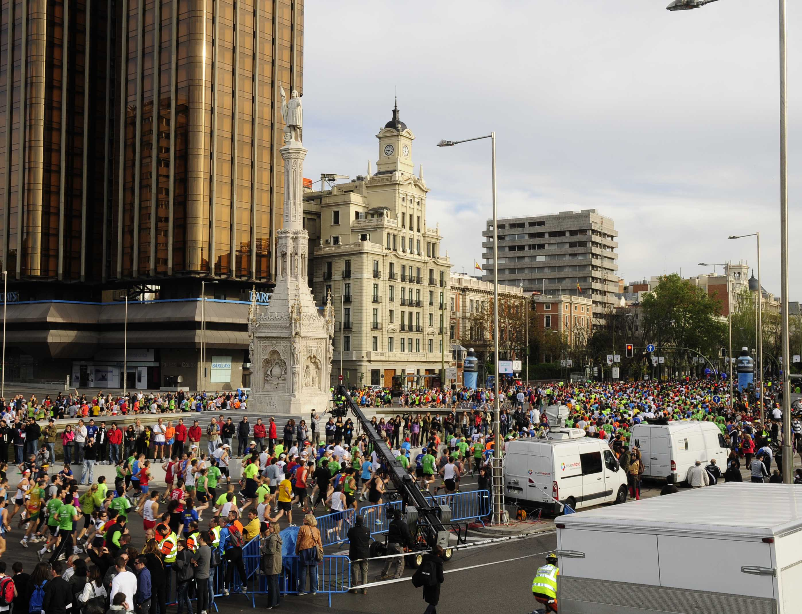 Maratón de Madrid 2016. Plaza de Colón